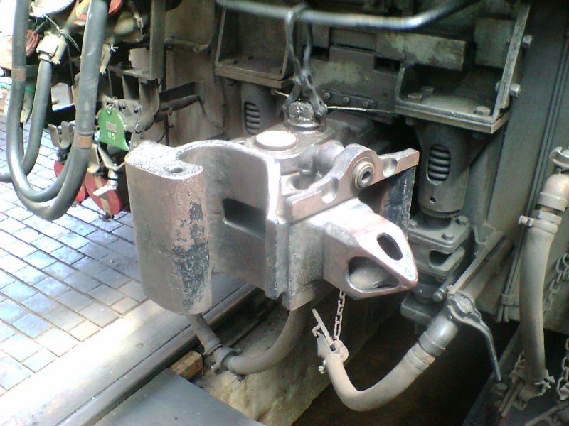 双頭連結器撮影地：碓氷峠鉄道文化むら撮影車両：EF63